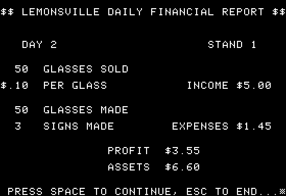 Lemonade Stand